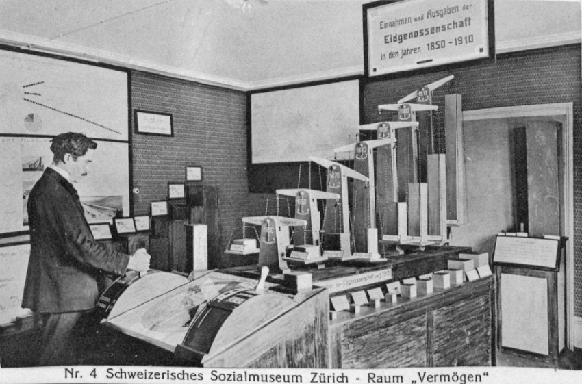 Eine Aufnahme aus dem Schweizerischen Sozialmuseum. Die Figurs zeigt die Entwicklung der Schweizer Staatseinnahmen und -Ausgaben zwischen 1850 und 1910.